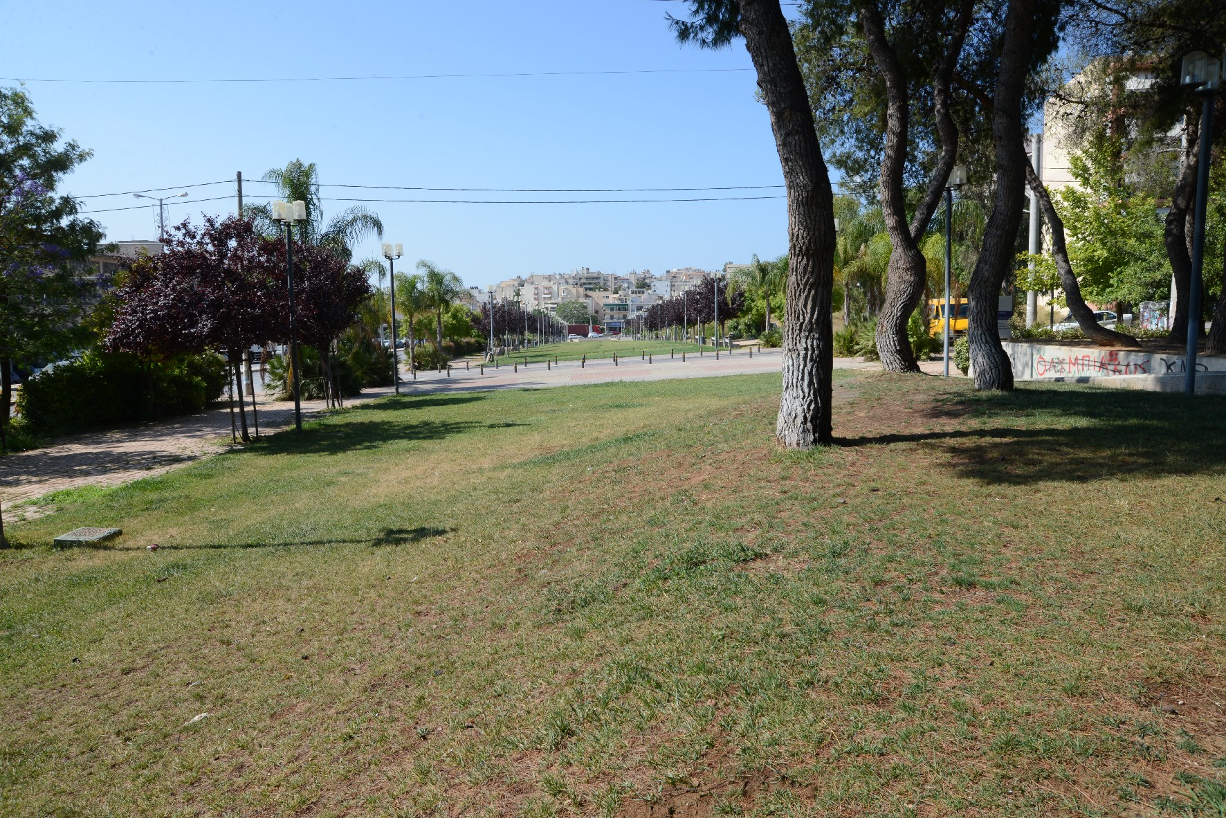 Το Πάρκο Ιστορικής Μνήμης και Περιβαλλοντικής Ευαισθητοποίησης στο Χαϊδάρι